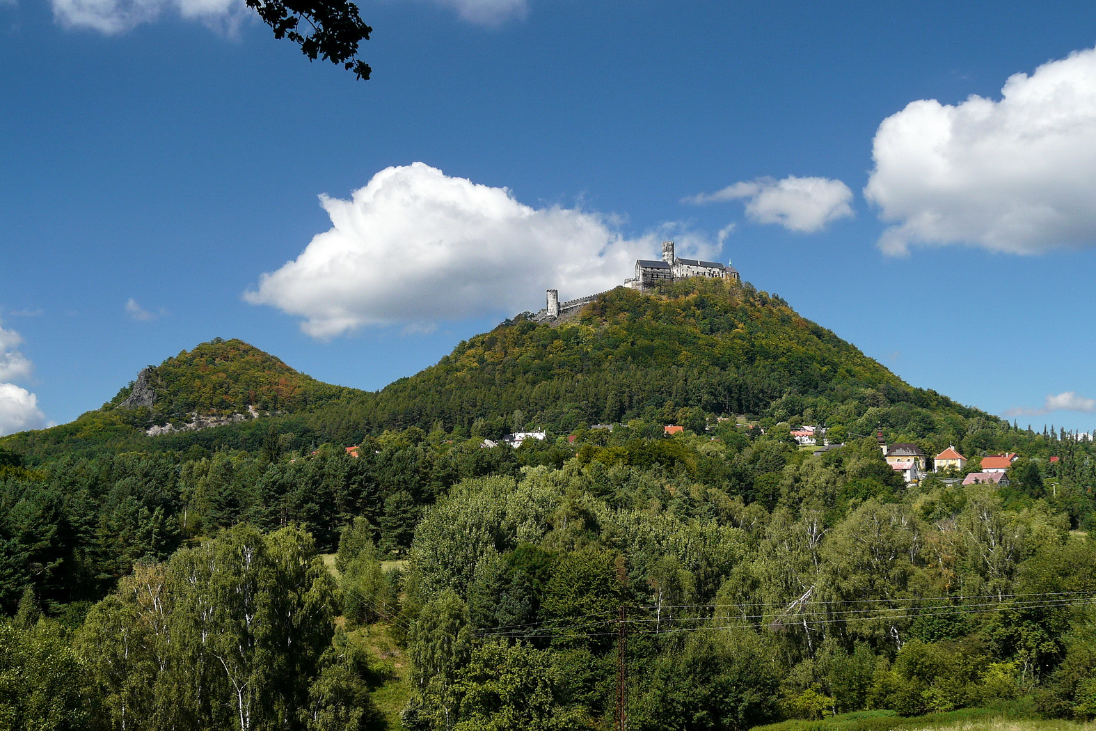 Bezdězy z Horky